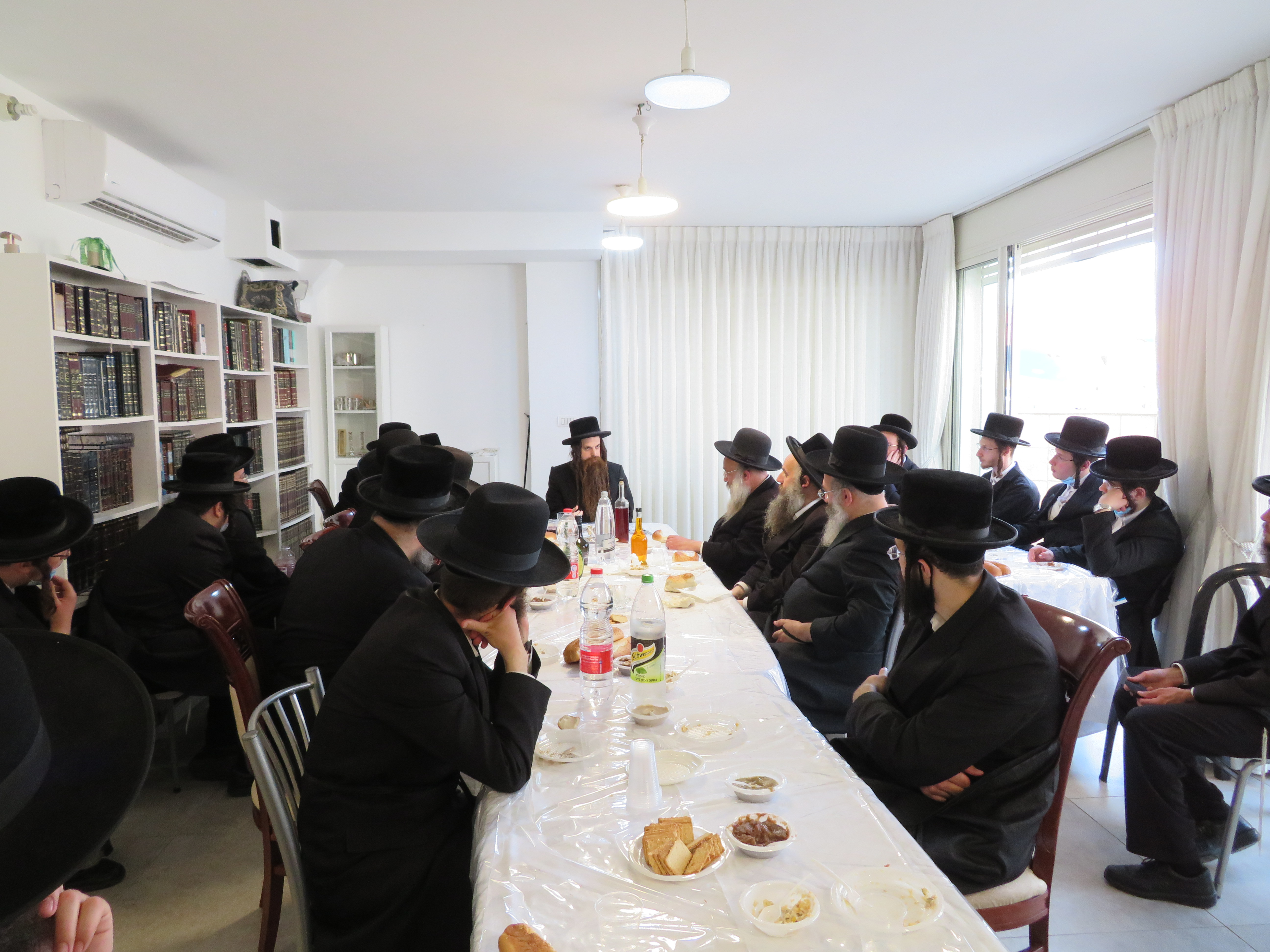 הרב מנחם קאליש, האדמו"ר מאמשינאוו שליט"א טיש ל"ג בעומר תש"פ